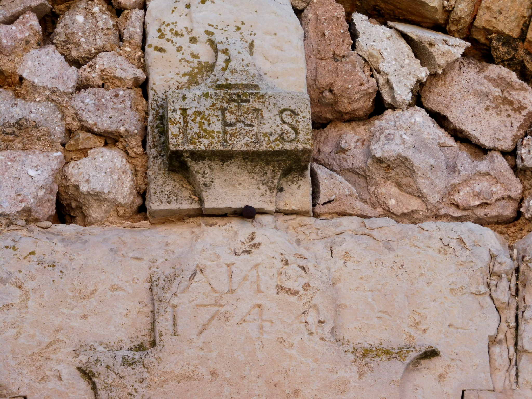 Església parroquial de Santa Maria de Tartareu (les Avellanes i Santa Linya): detall del portal